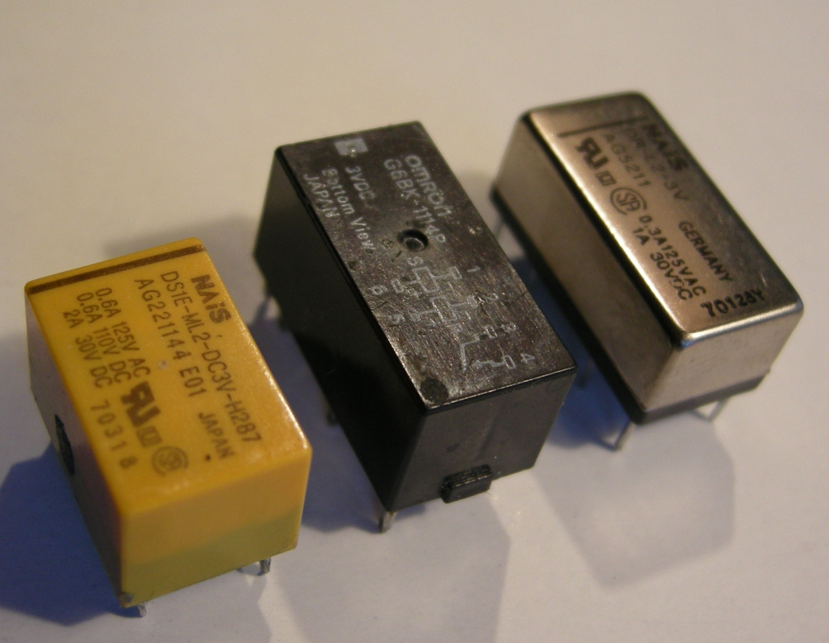 Bistabiele relais voor 3 volt, zoals gebruikt in kamerthermostaten